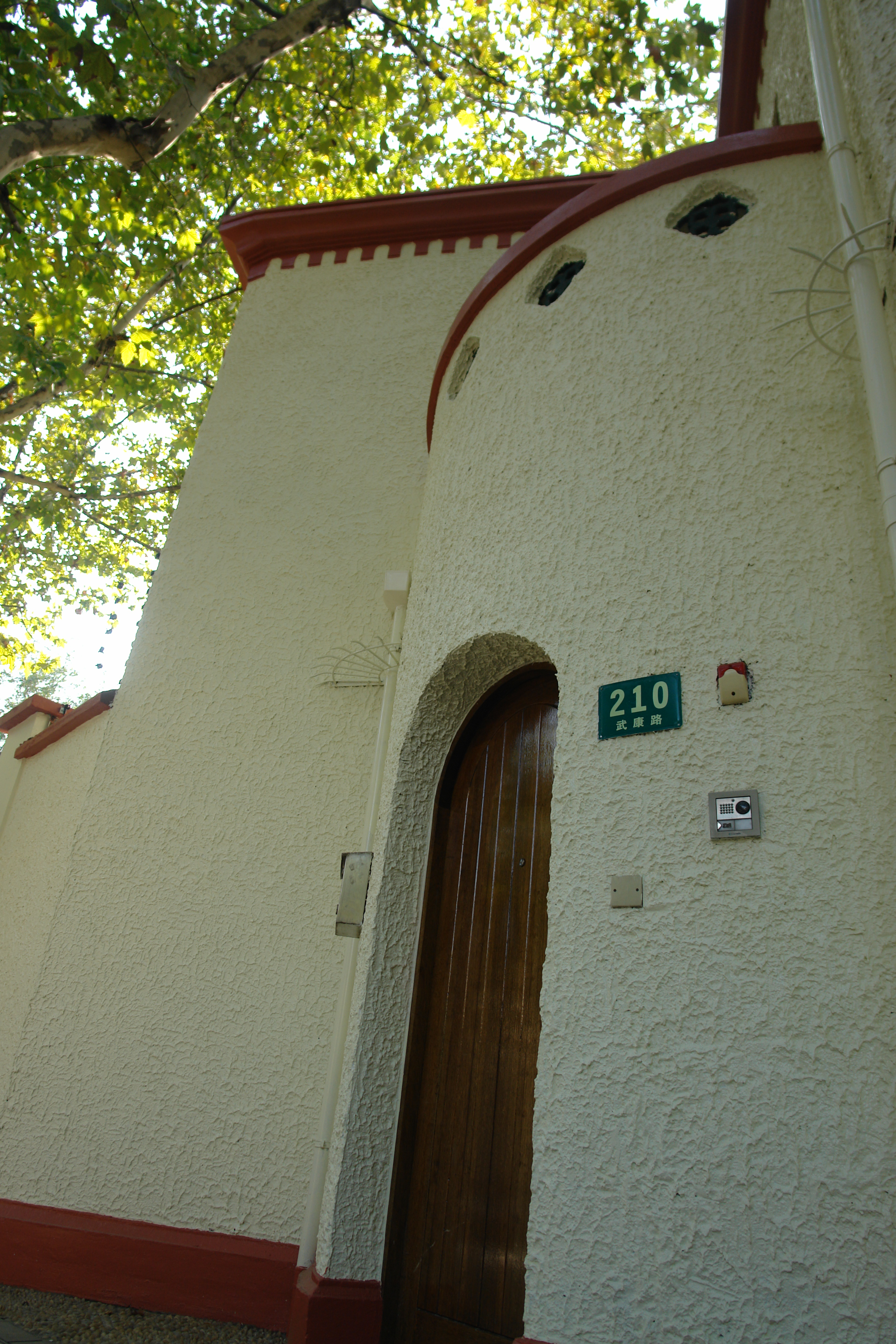 武康路210号